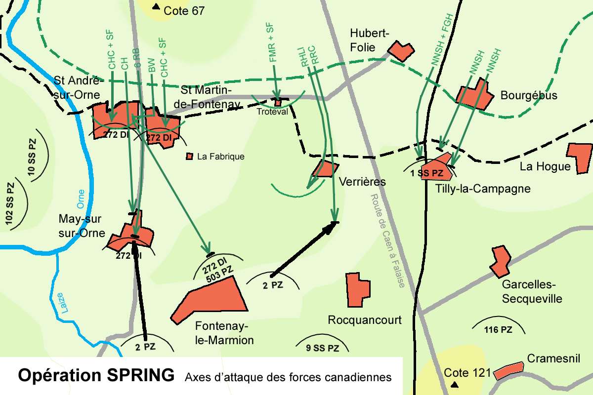 opération Spring, attaques des troupes canadiennes